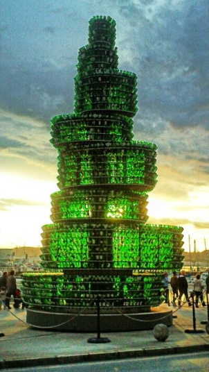 Árbol hecho con botellas de sidra recicladas situado en el puerto deportivo de Gijón, Asturias.